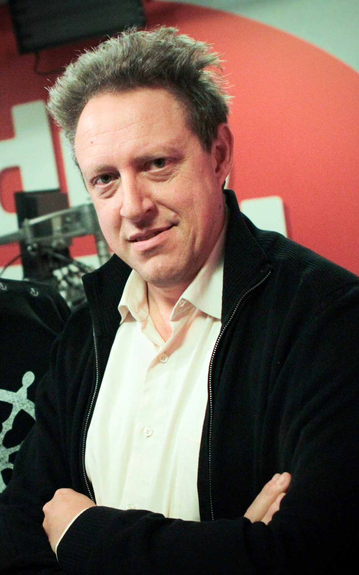 Taaladviseur Ruud Hendrickx